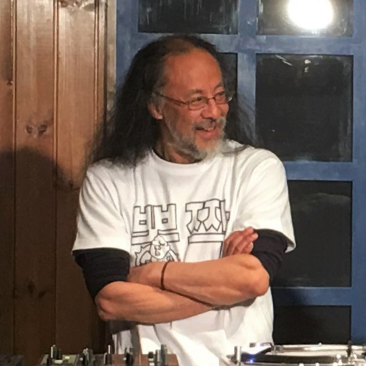 Mangaka Takashi Nemoto nel 2017